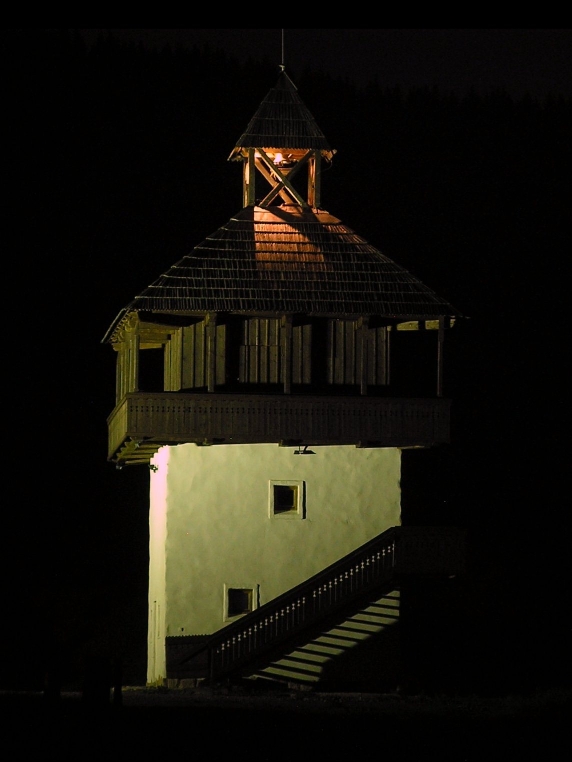 Veľké Borové, zvonica pri hornom penzióne (je to zároveň esteticky poňatá trafostanica)